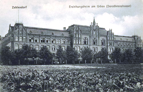 Erziehungsheim „Am Urban” in Berlin-Zehlendorf, Dorotheenstraße 3/5 (heute Gimpelsteig 9). Das Gebäude wurde von 1895 bis 1896 vom Architekten A. Bohm errichtet. Es wurde im 2. Weltkrieg weitgehend zerstört. Die erhaltenen Gebäudeteile wurden unter Denkmalschutz gestellt, 1995 aber für Neubauten des Behring-Krankenhauses abgerissen.